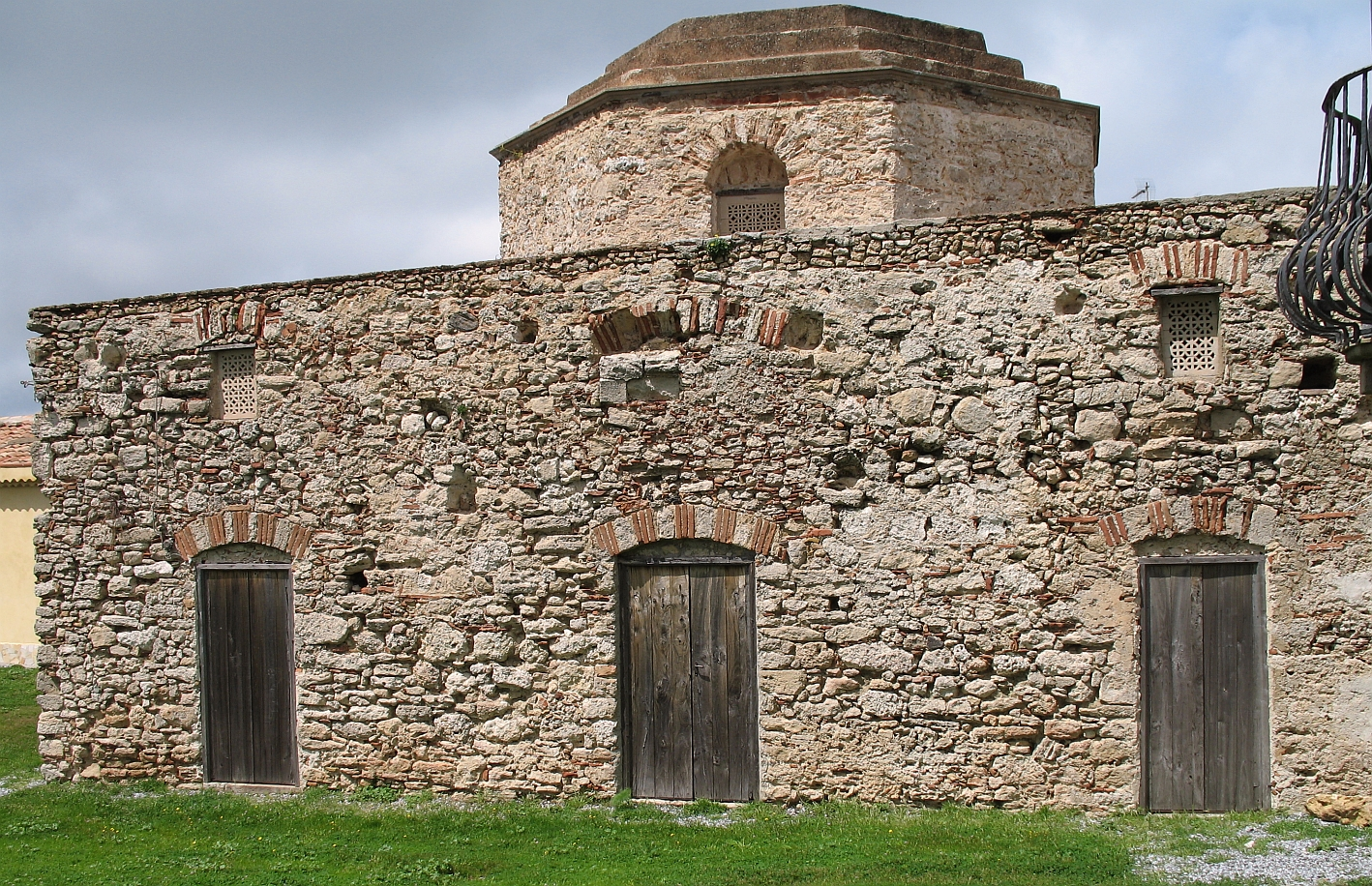 Rometta ME Chiesa Bizantina